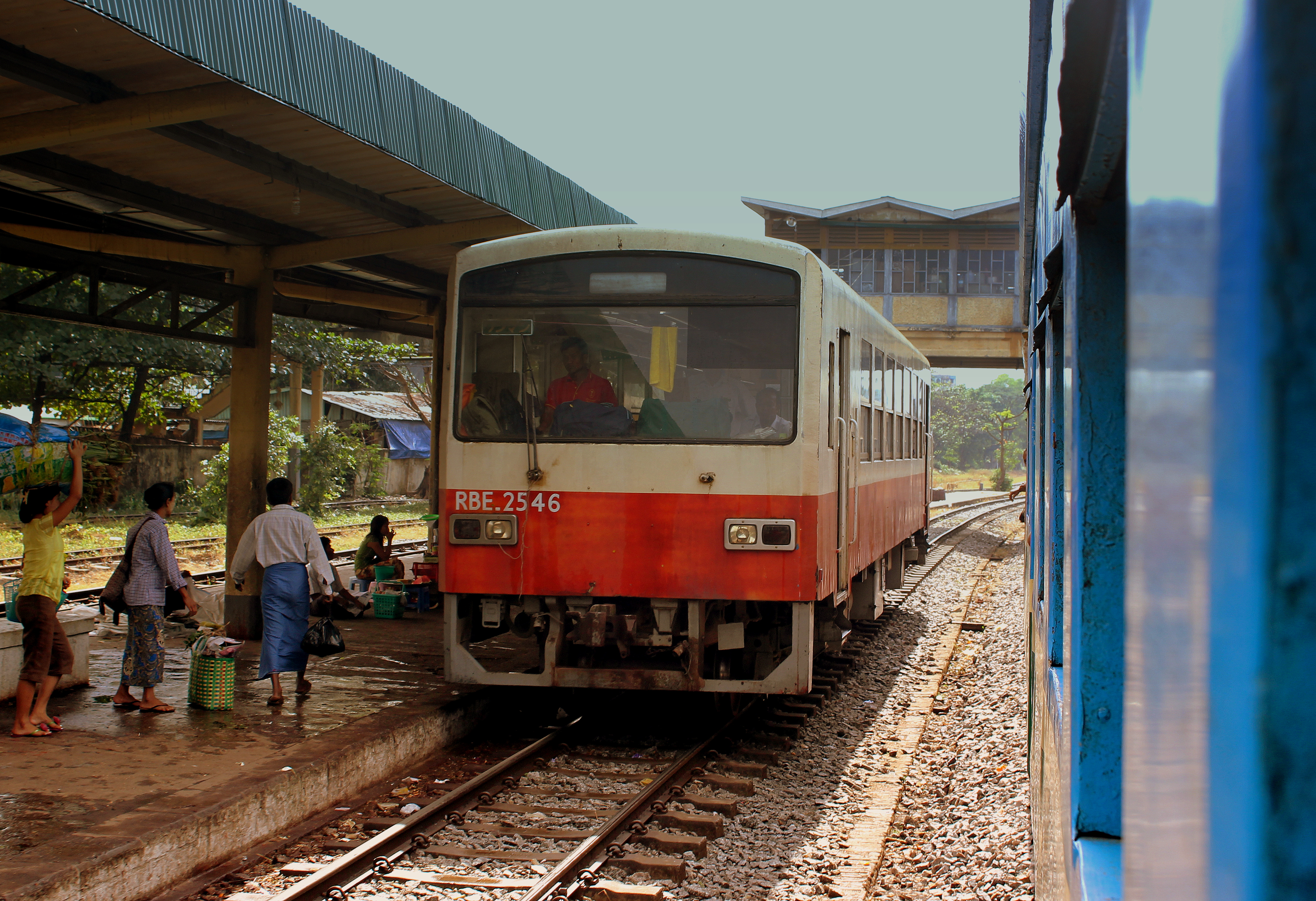 DIESEL RAICAR MYANMAR RAILWAYS YANGON CIRCULAR YANGON MYANMA JAN 2013